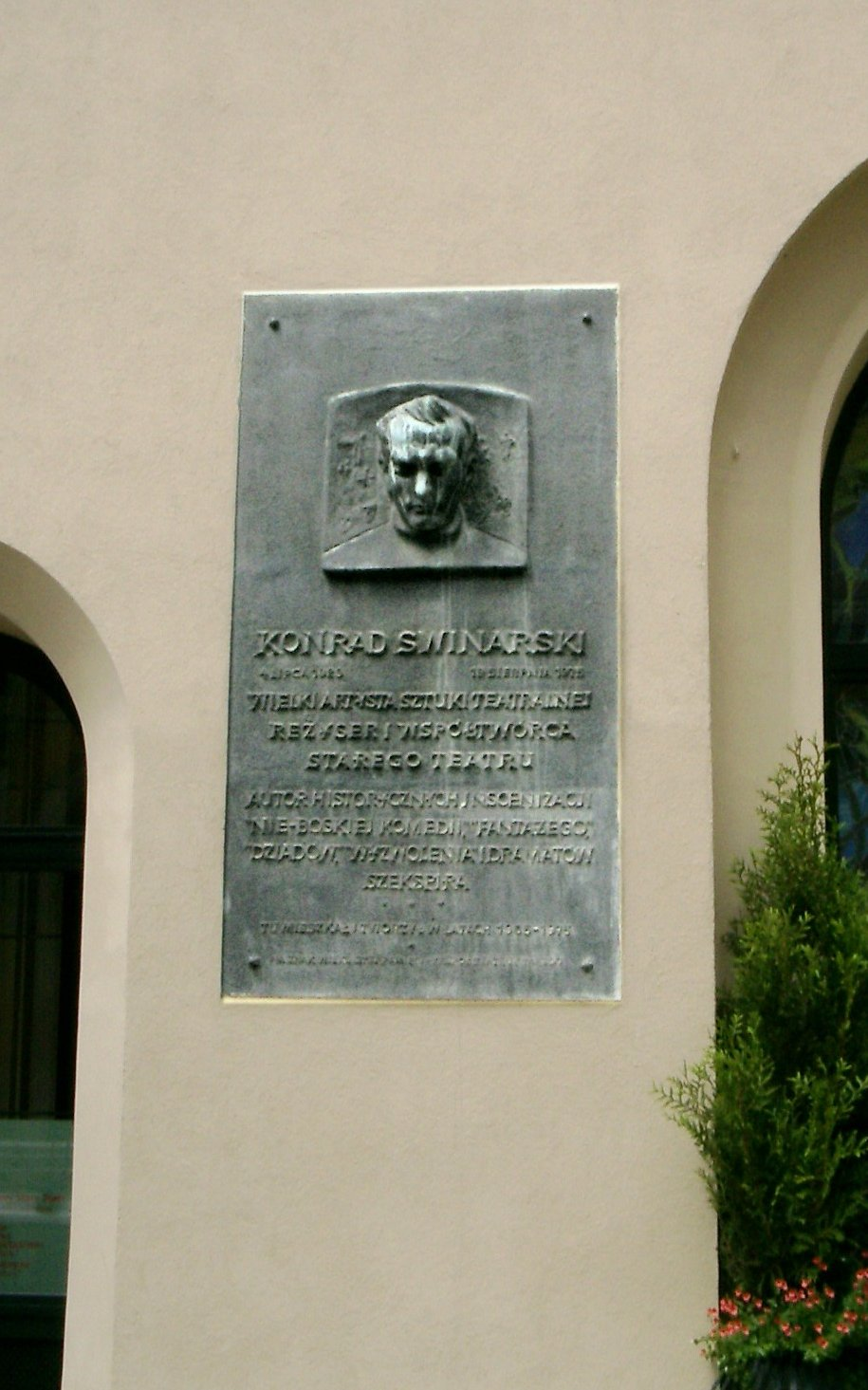 Kraków. Tablica upamiętniająca Konrada Swinarskiego